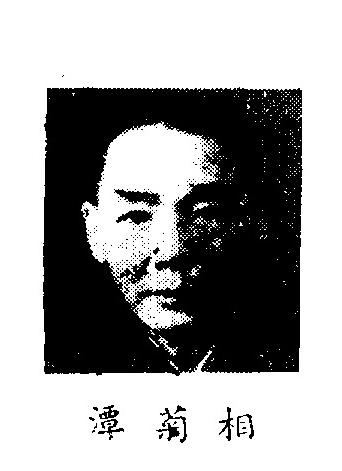 中文（中国大陆）: 制憲國民大會代表